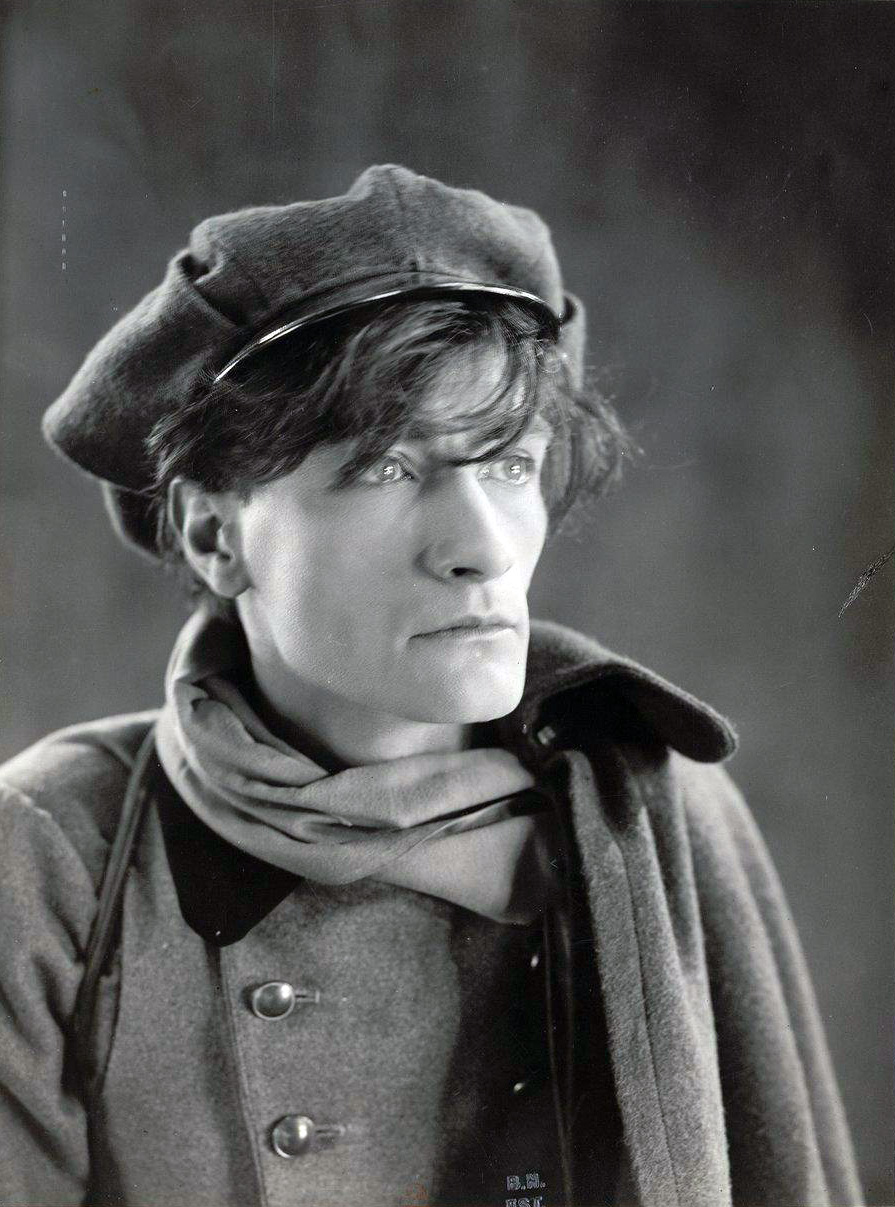 Portrait d'Antonin Artaud.